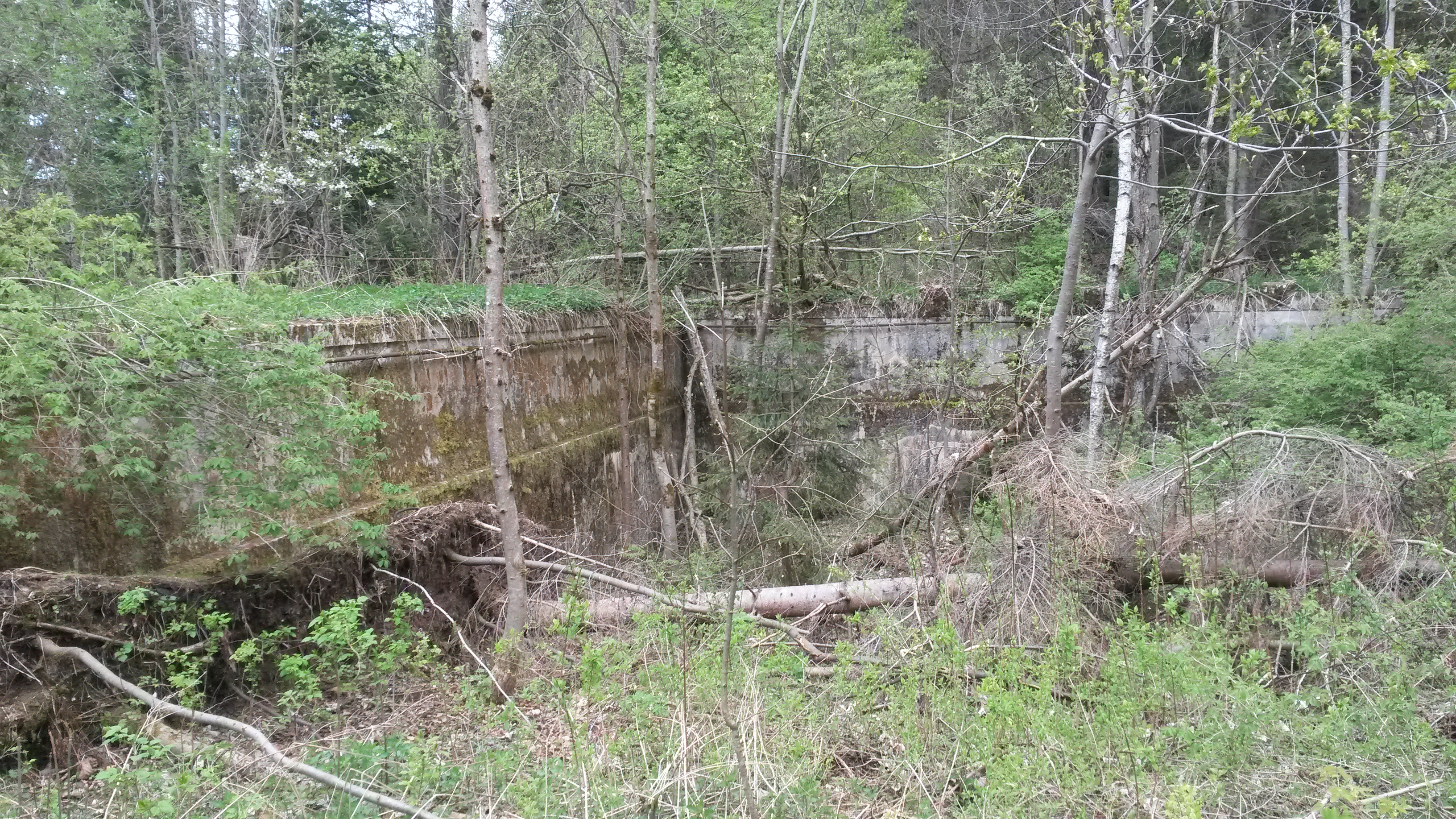 Ruine des Alpenstrandbades Semmering (Österreich): Großes Schwimmbecken, Blick aus Ost.